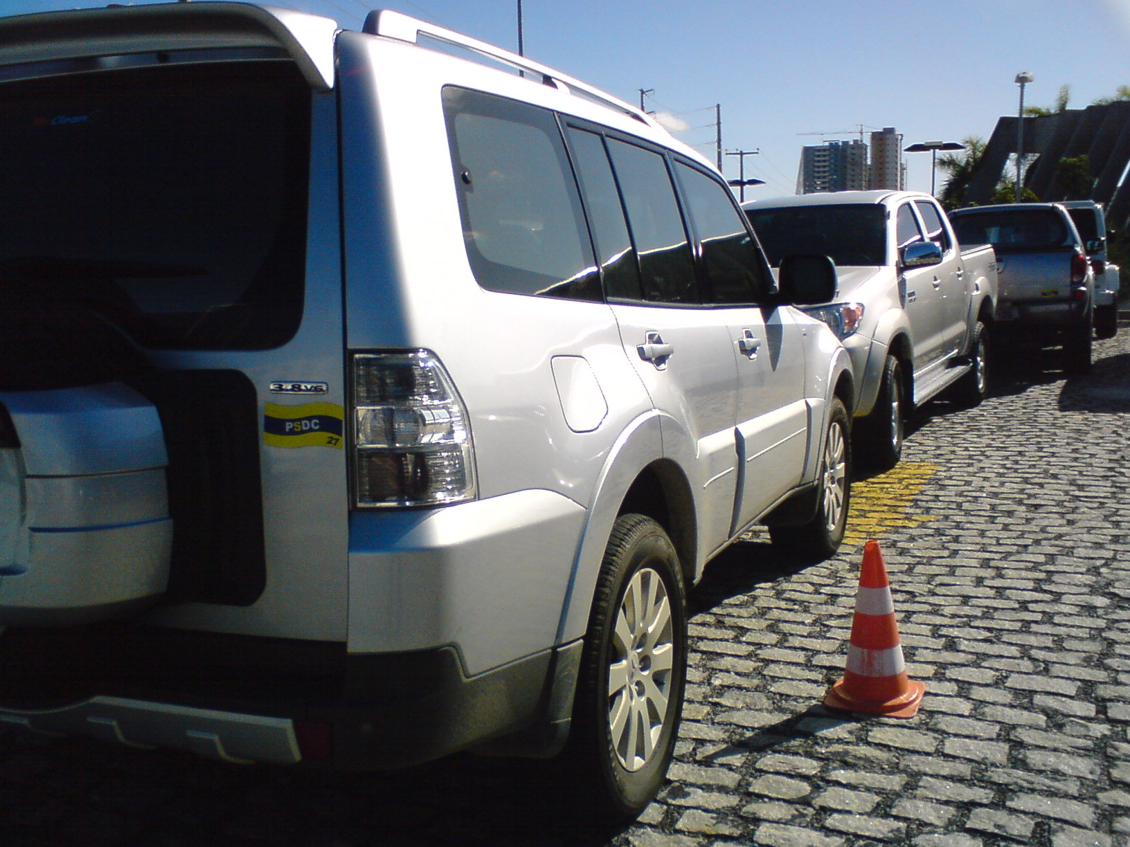 Veículos apreendidos durante a Operação Hígia, estacionados no pátio da Superintendência da Polícia Federal em Natal, Rio Grande do Norte.